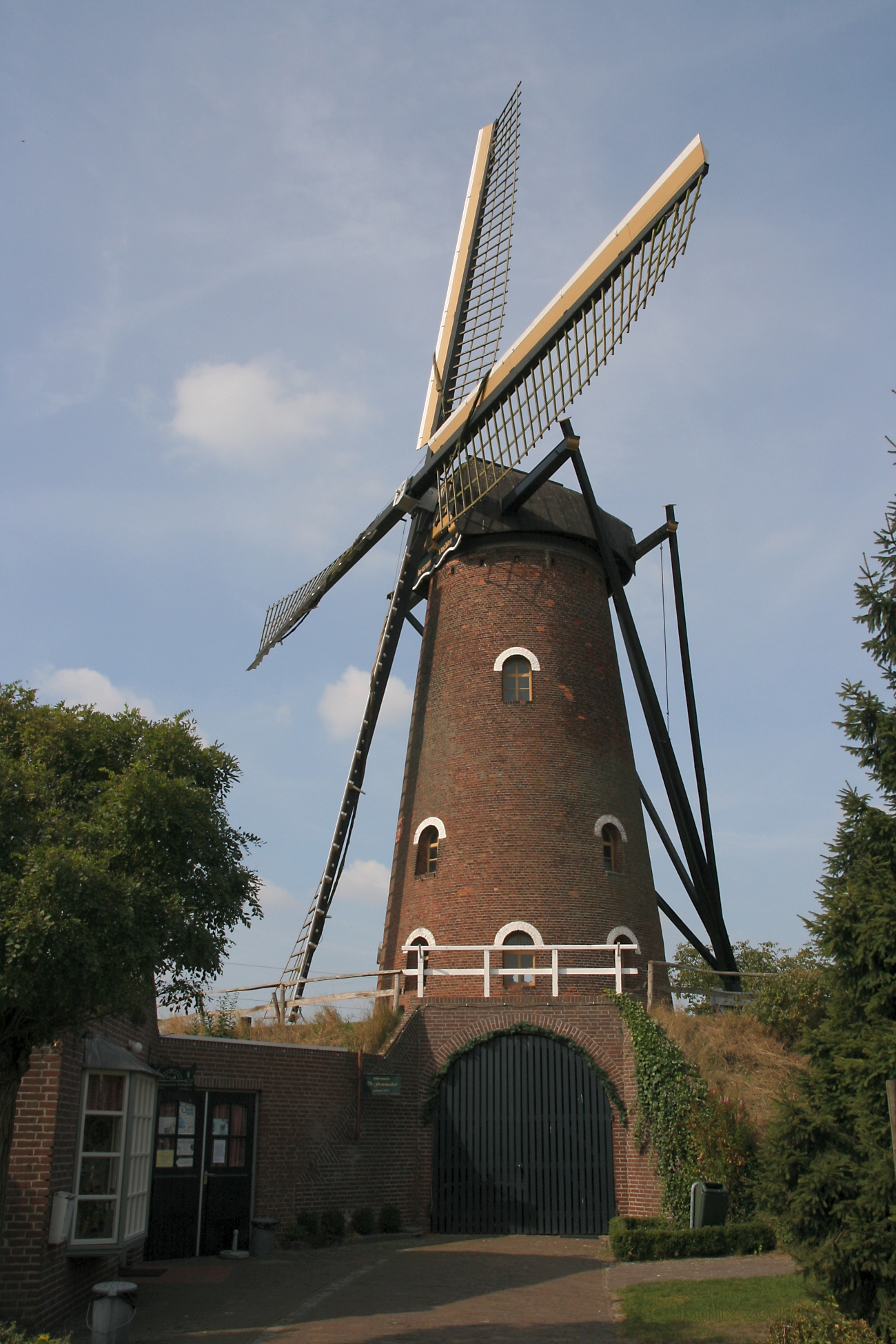 Luycksgestel: Molen de Grenswachter